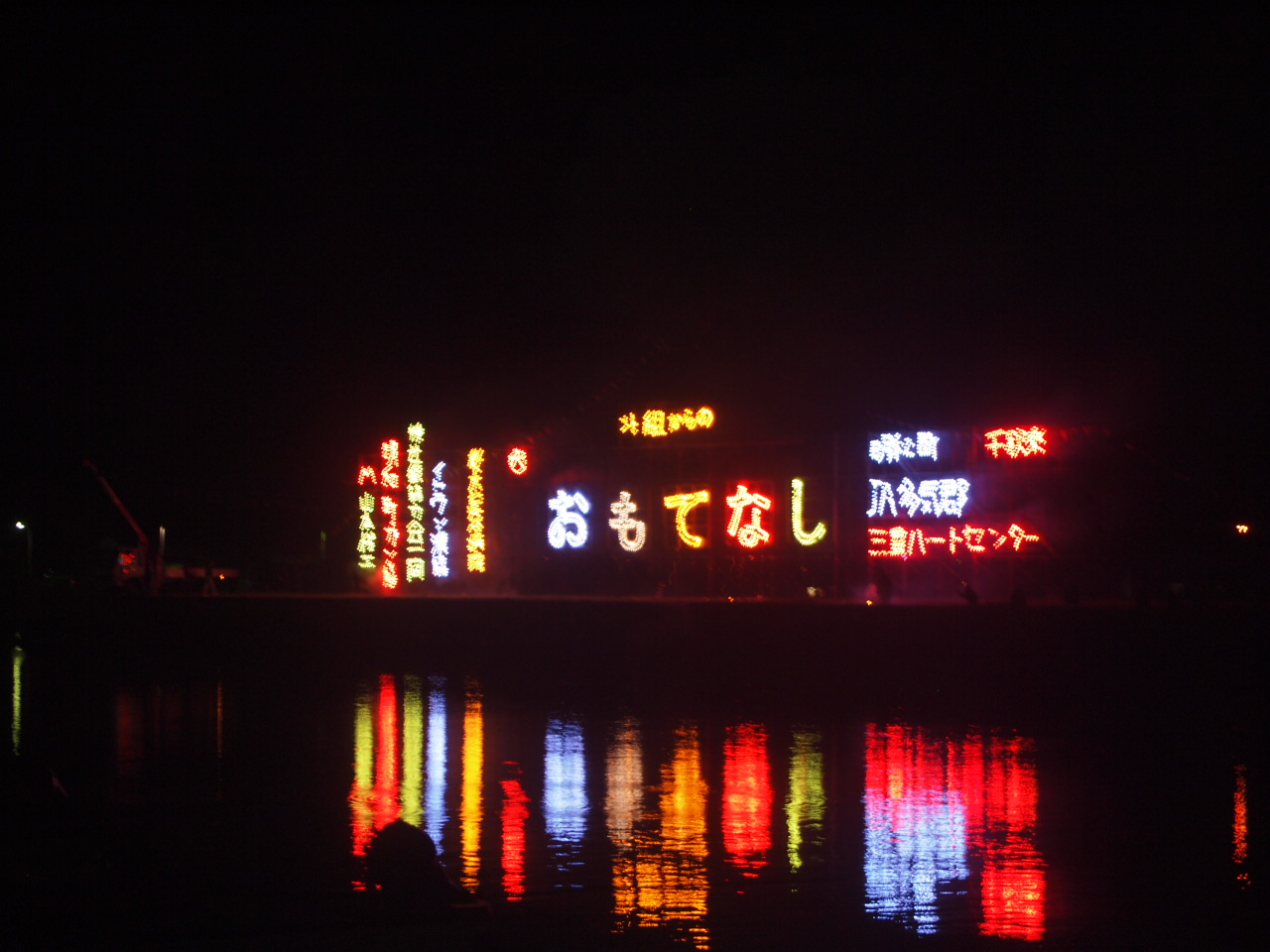 大淀祇園祭・千秋楽万歳の仕掛け花火